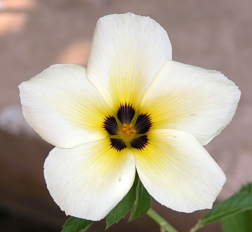 White Turnera Turnera subulata; cultivated, Singapore